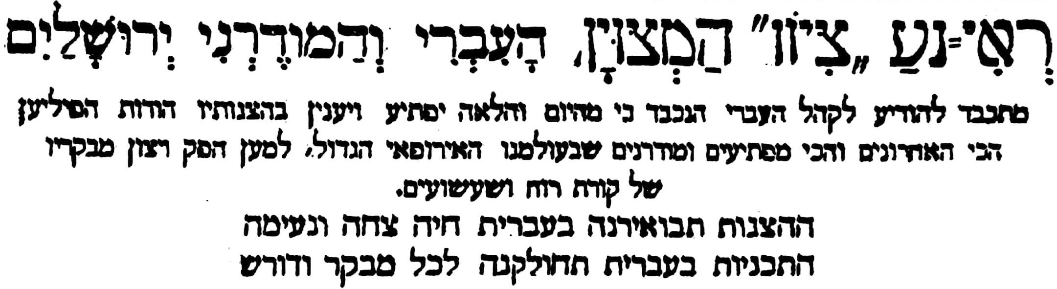 מודעת פרסומת לראינוע ציון בירושלים 1919